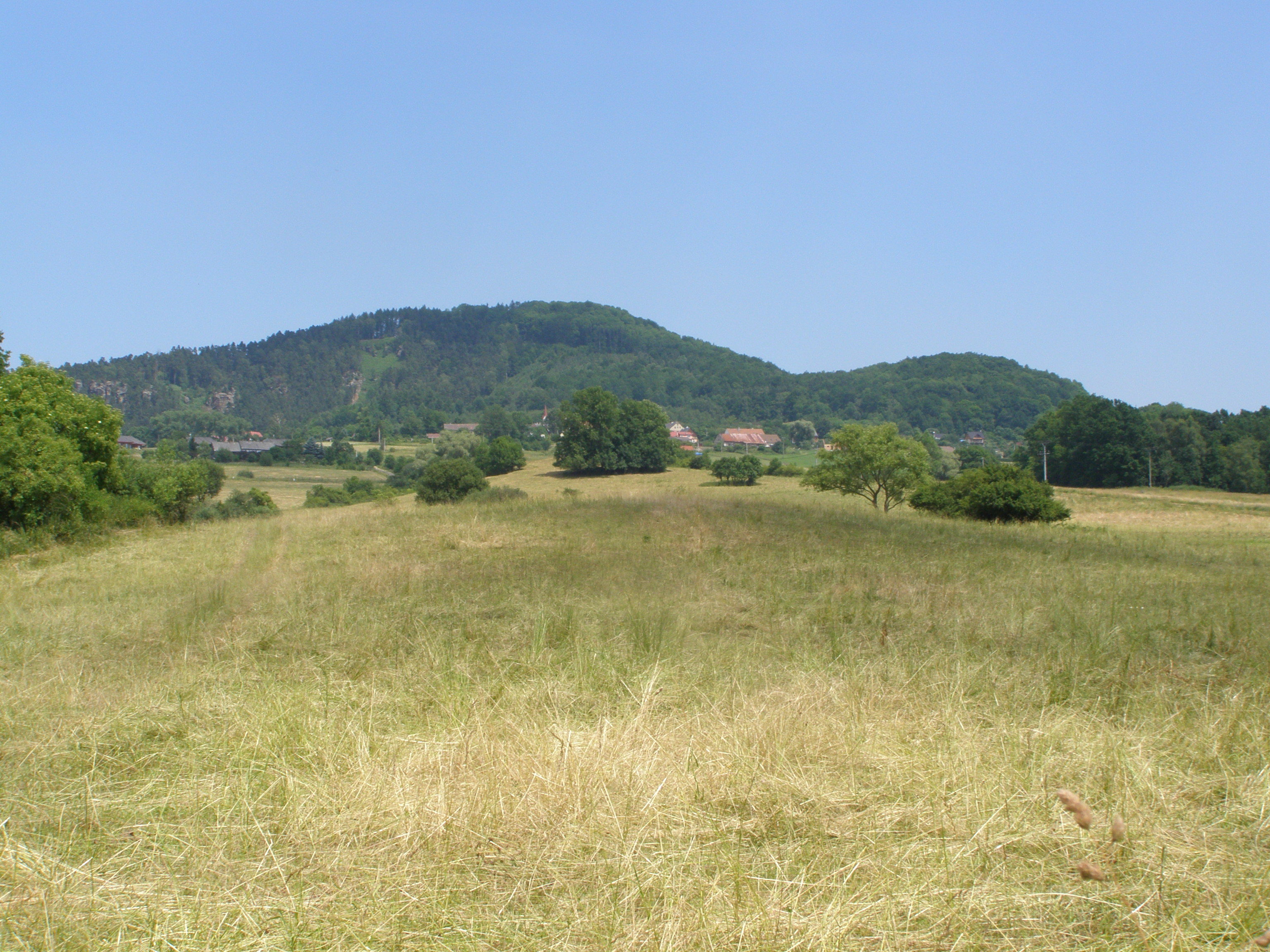 Česky: Cvikovská pahorkatina, vrchol Tisový vrch (540 m), v jeho úbočí obec Svojkov, pohled od jihozápadu